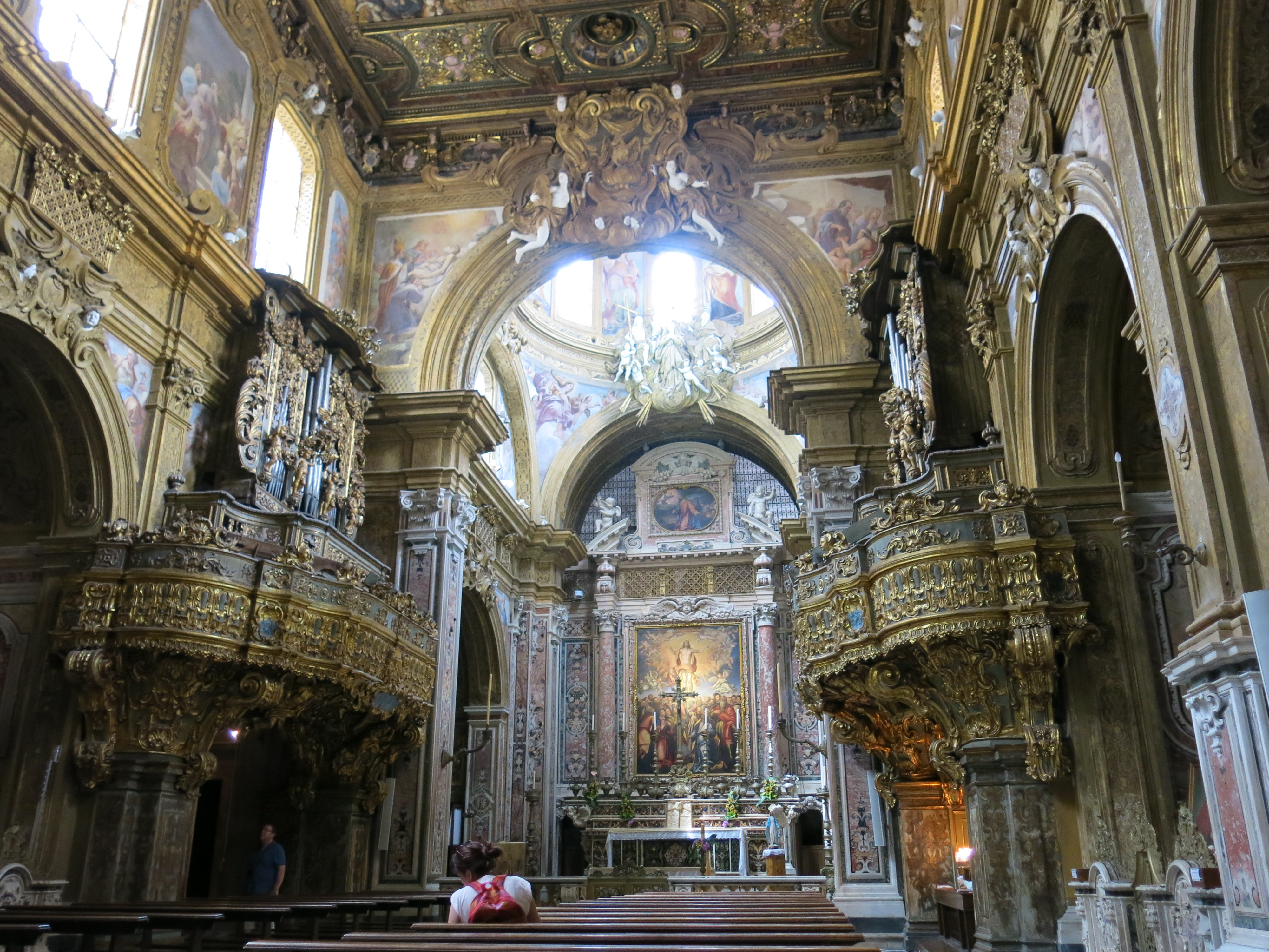 Le chiese di Napoli